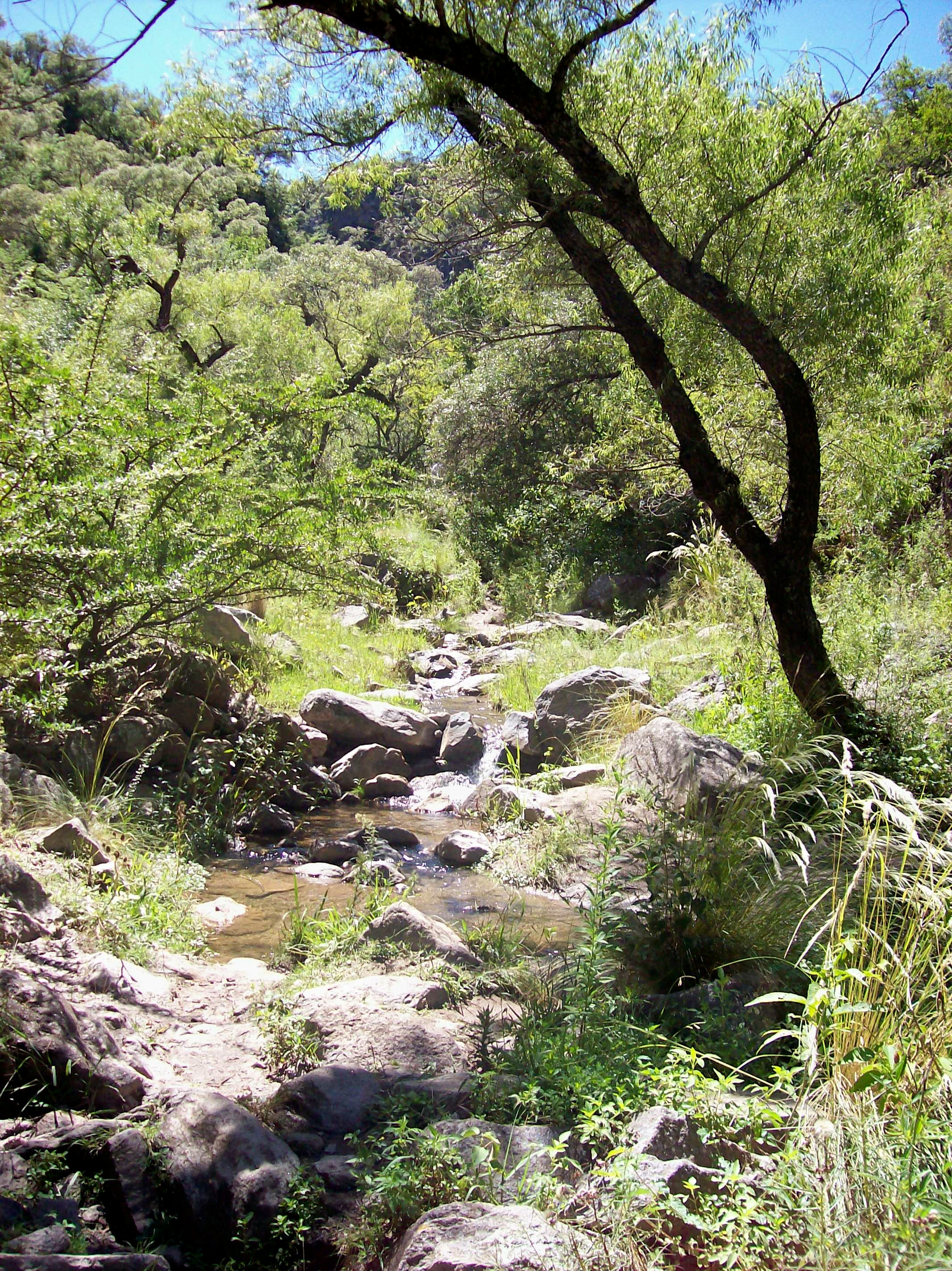 Caminata por Vaquerías, en las afueras de Valle Hermoso, pcia. de Córdoba, Argentina. Las coordenadas dadas son aproximadas, con (estimo) no más de 300 m de error de la posición correcta